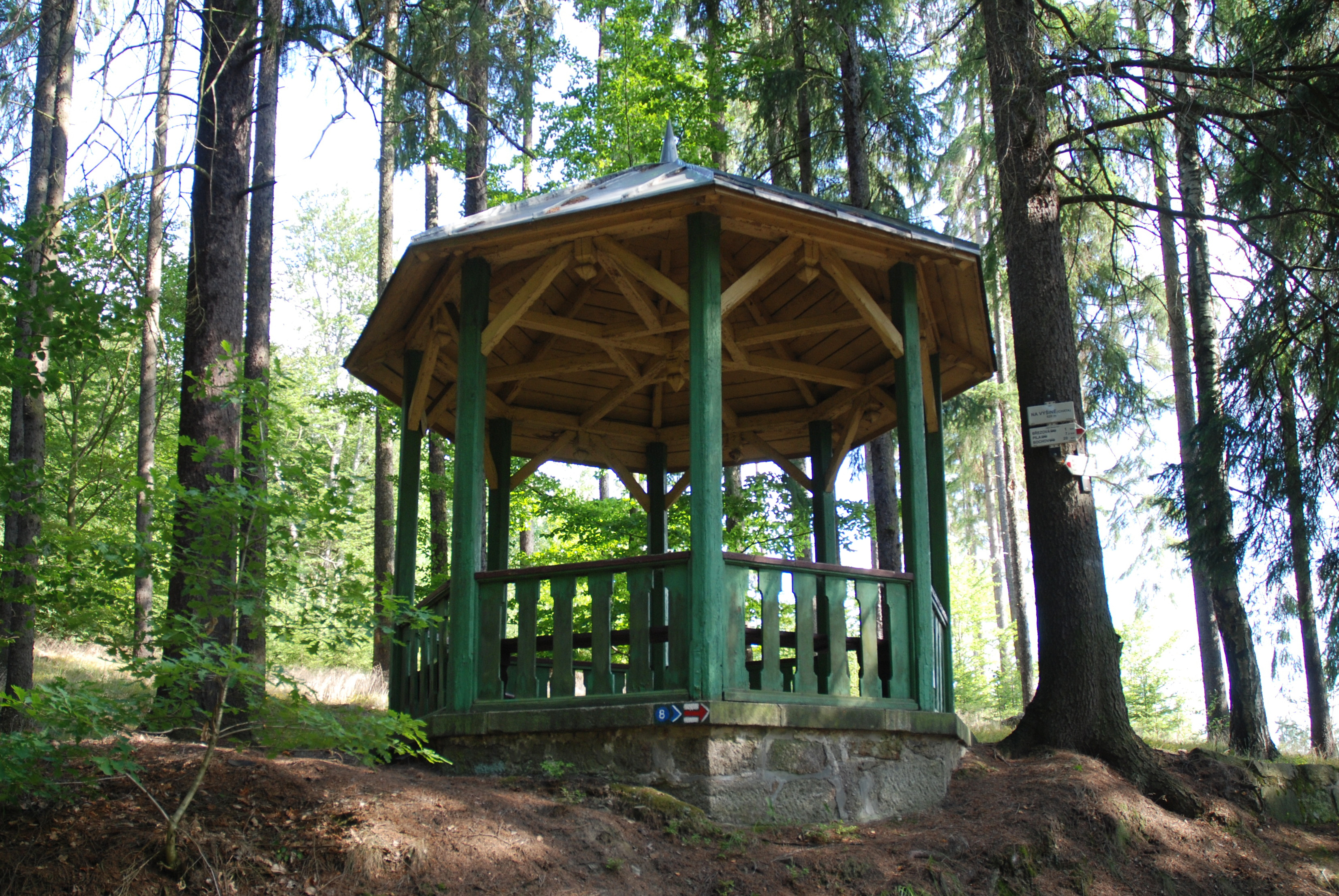 Altán Na Výšině v karlovarských lázeňských lesích nad Okružní cestou